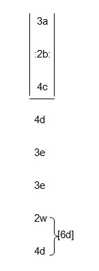 Tonschema des Liedes VIII (Guot wîp, ich bite dich minne) von Wolfram von Eschenbach